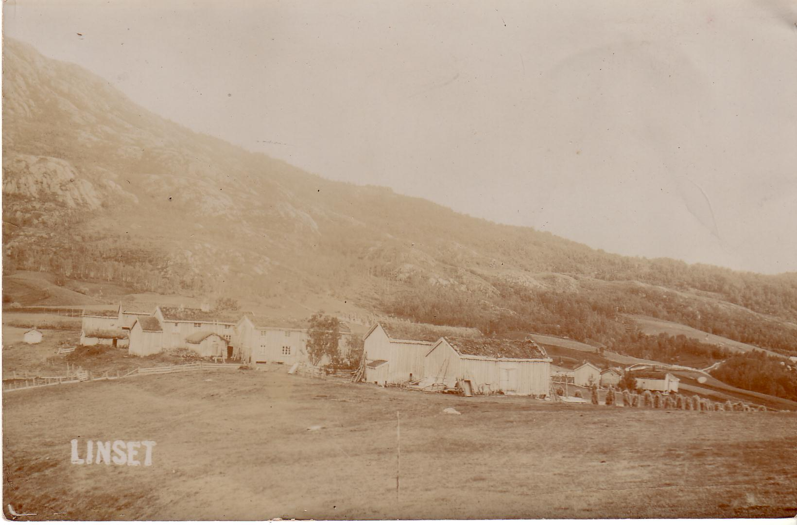 Fra gamle dager da fortsatt 3 av gårdene på Lindset lå samlet. Negarden (Vollen) var flyttet ut.